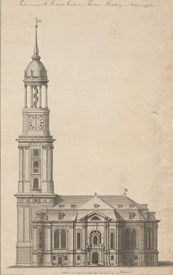 Facade der großen St. Michaelis-Kirche und des Thurms, in Hamburg, von Süden anzusehen [Seitenriss], Kupferstich